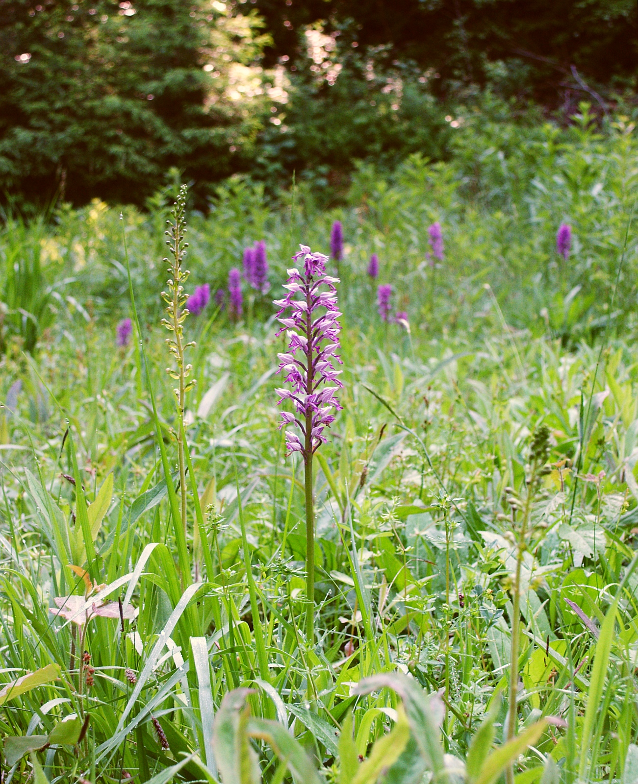 Orchis militaris, Schwäbisch-Fränkischer Wald, Germany left: Listera ovata, background: Dactylorhiza majalis